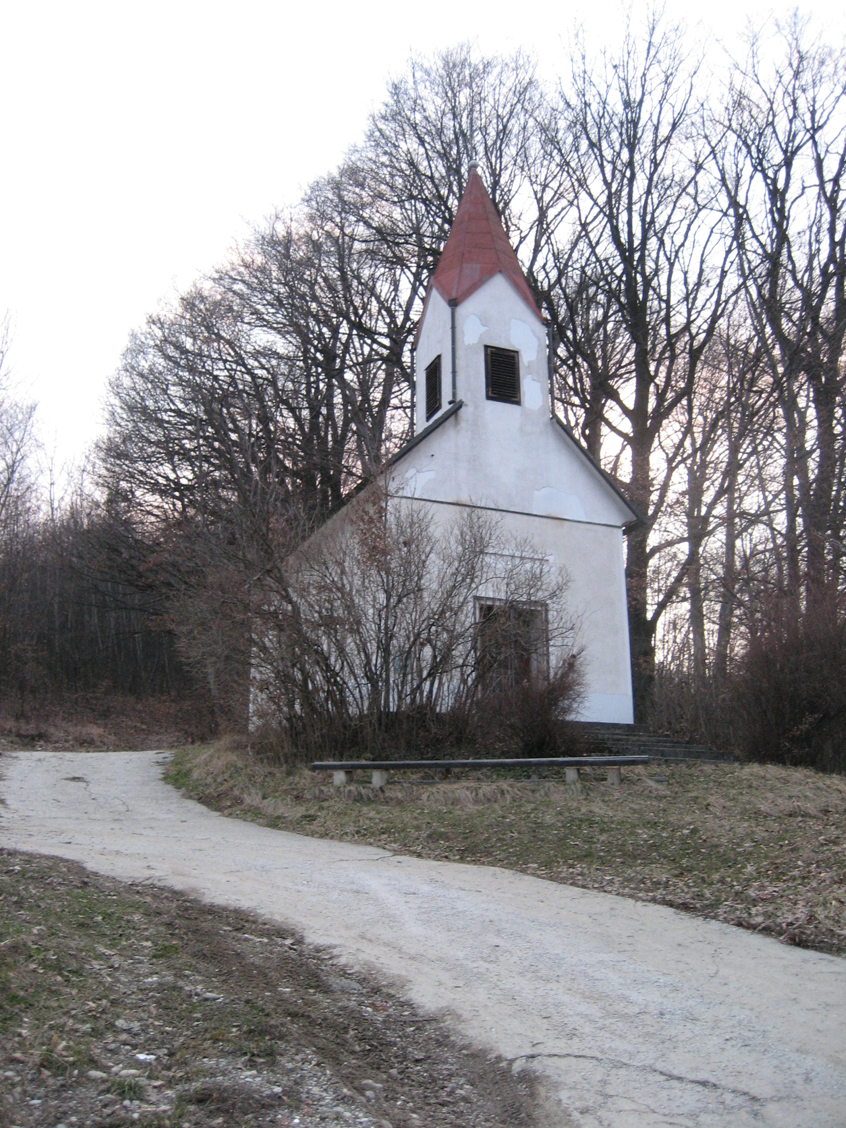 Kapelica nad Ribniškim selom.